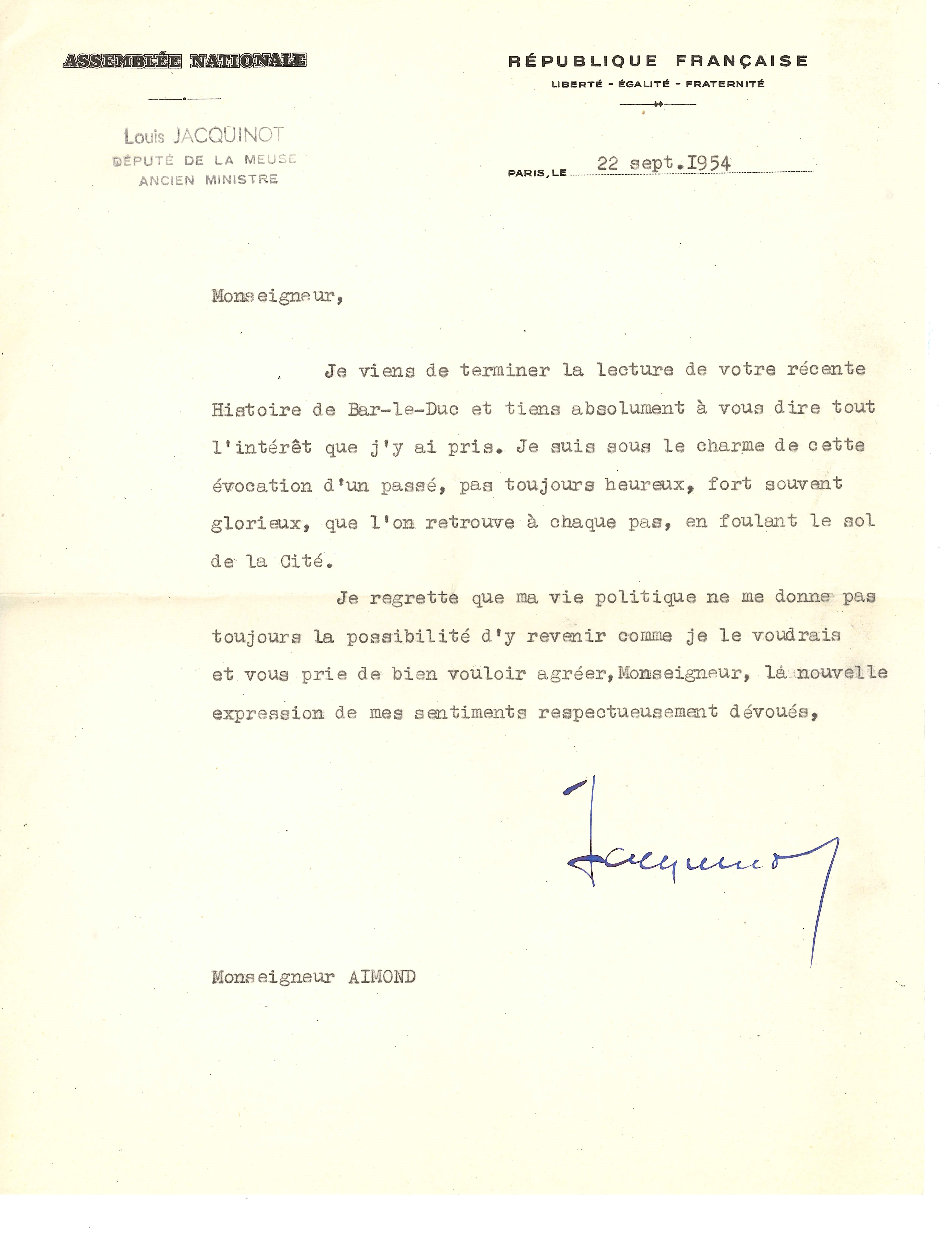 Lettre signée de Louis Jacquinot (1898–1993), député de la Meuse et ministre français. Cette lettre fut adressée à Monseigneur Charles Aimond à la suite de la publication de son livre Histoire de Bar-le-Duc (Grand Prix de l'Académie de Stanislas 1953). Source : Archives Jean Grosdidier de Matons (1926–2017), sans doute par sa nièce Jeanne Buitge qui accompagna Mgr Aimond au cours de sa vie.